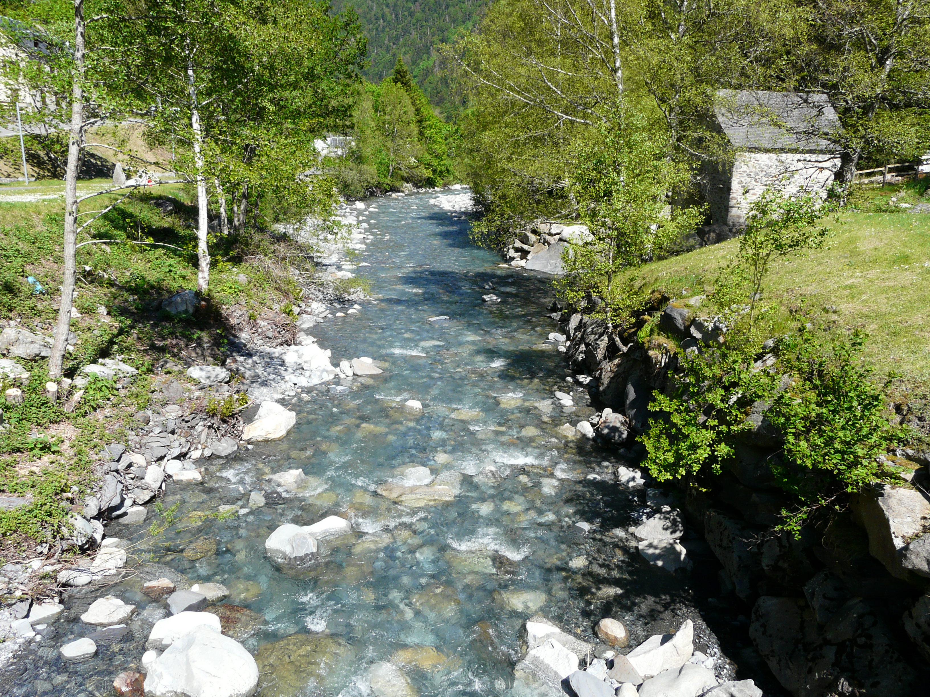 La Neste d'Aure en aval du pont de Moudang, Aragnouet, Hautes-Pyrénées, France.